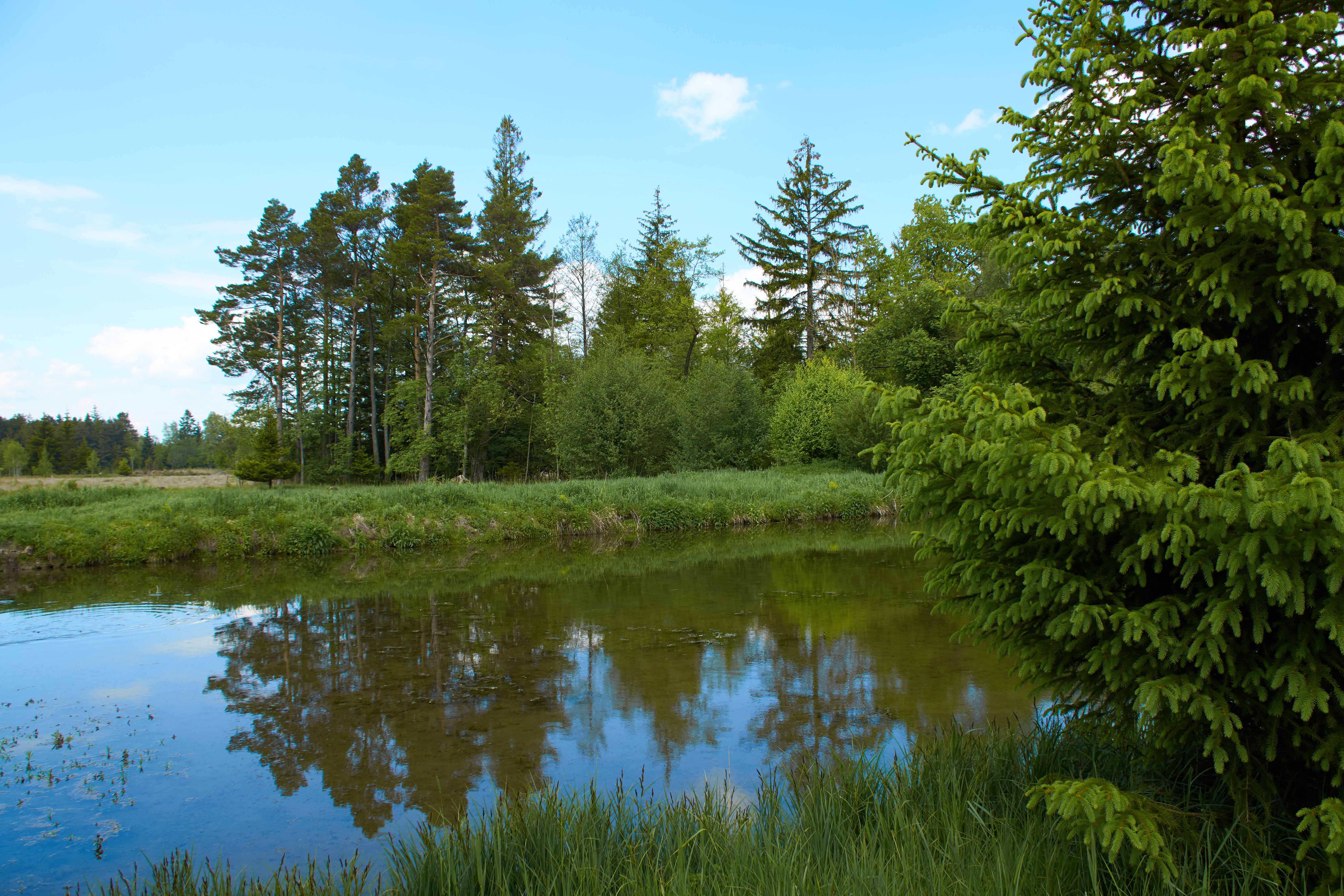 (NSG:BY-NSG-00086.01)_Benninger Ried